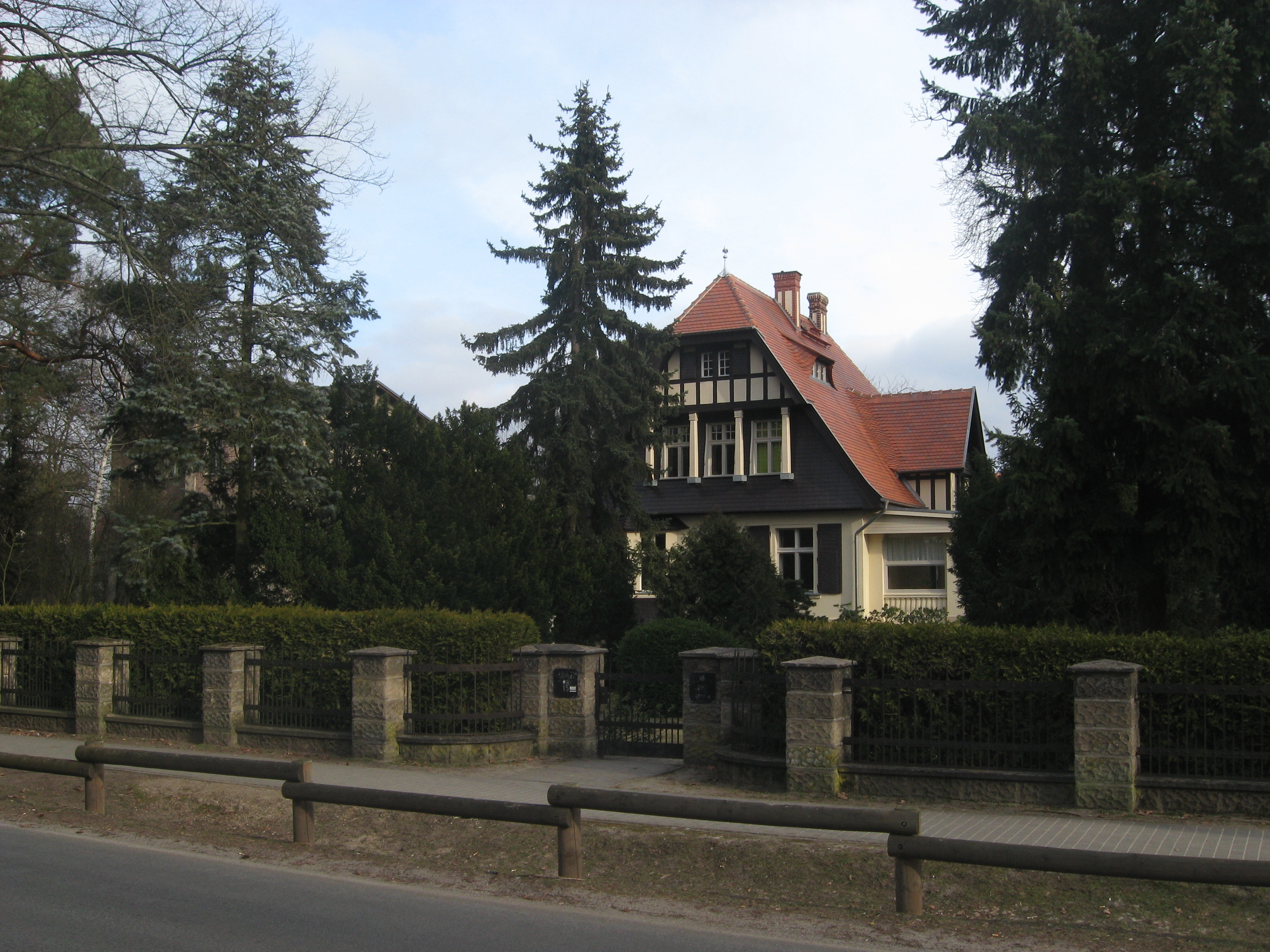 unter Denkmalschutz stehende Villa im Oranienburg, Ortsteil Lehnitz